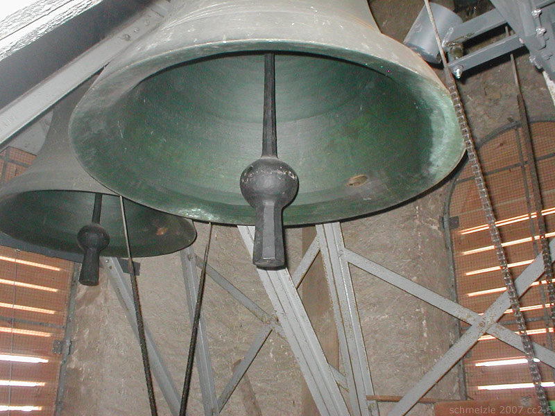 Glockenstuhl der evang. Kirche in Bad Rappenau-Bonfeld, Baden-Württemberg, Deutschland